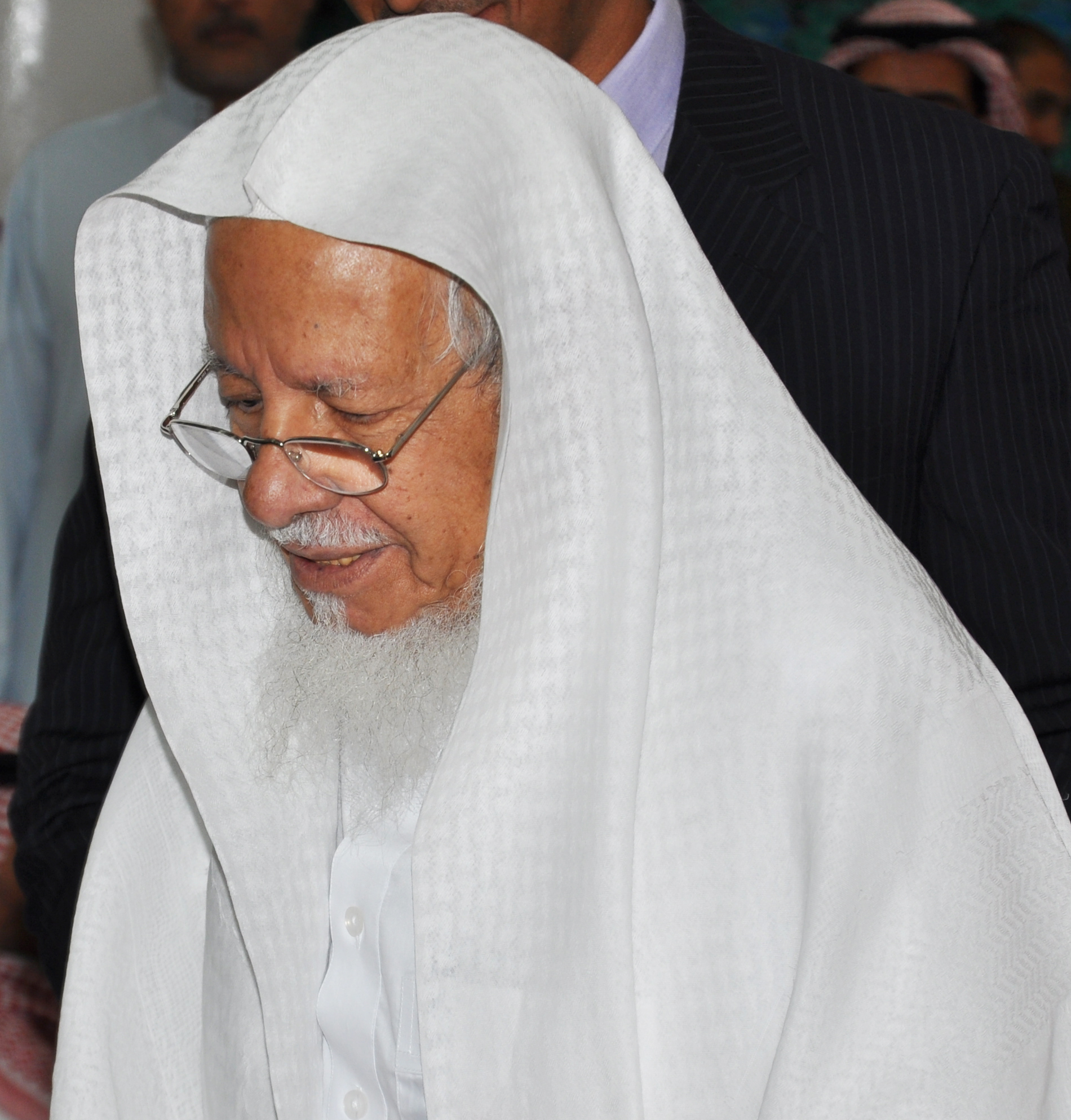 أ.د. محمد بن إسماعيل ظافر في حفل خريجي الثانوية العامة عام 1436 هـ